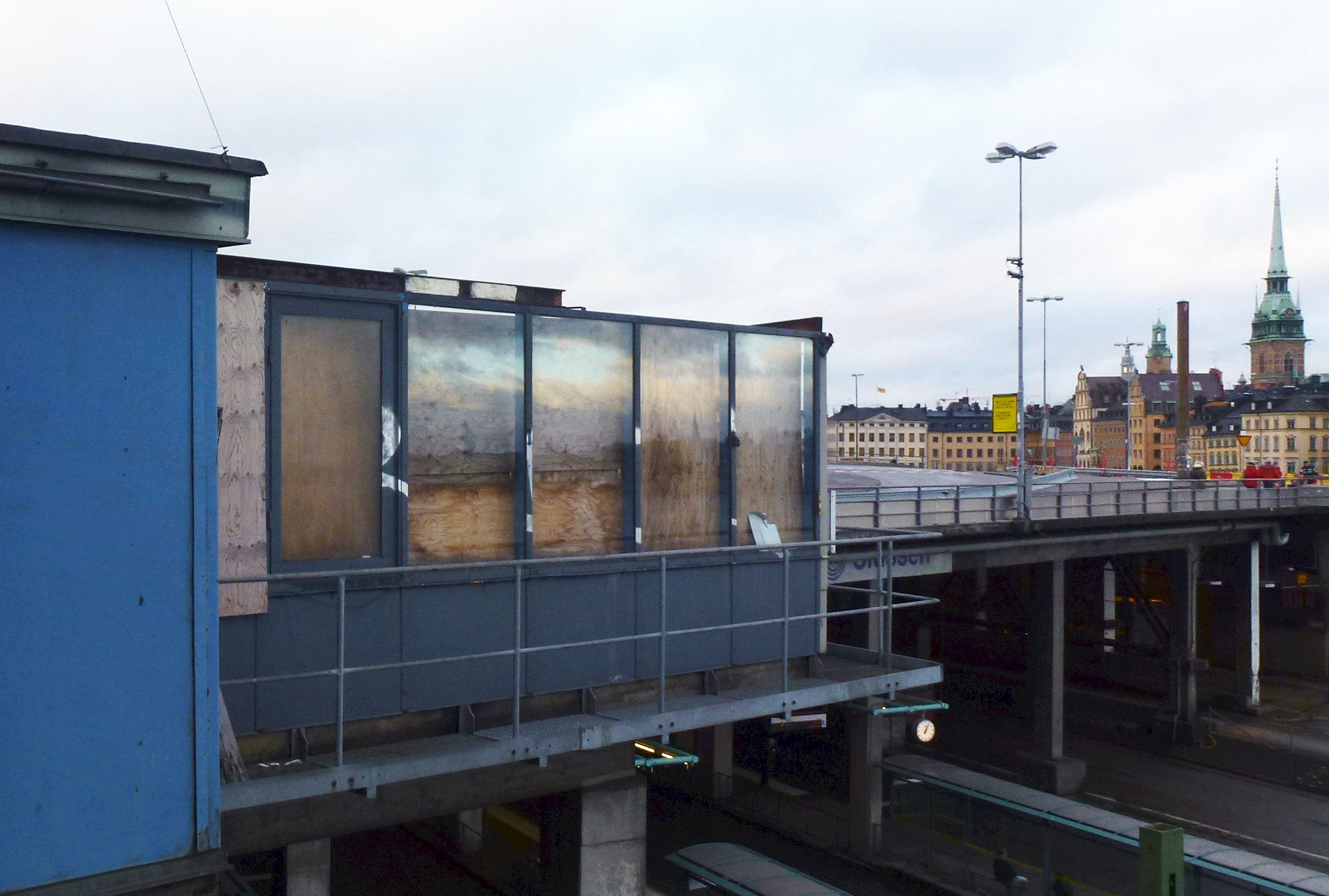 Slussens blomsterkiosk rivs